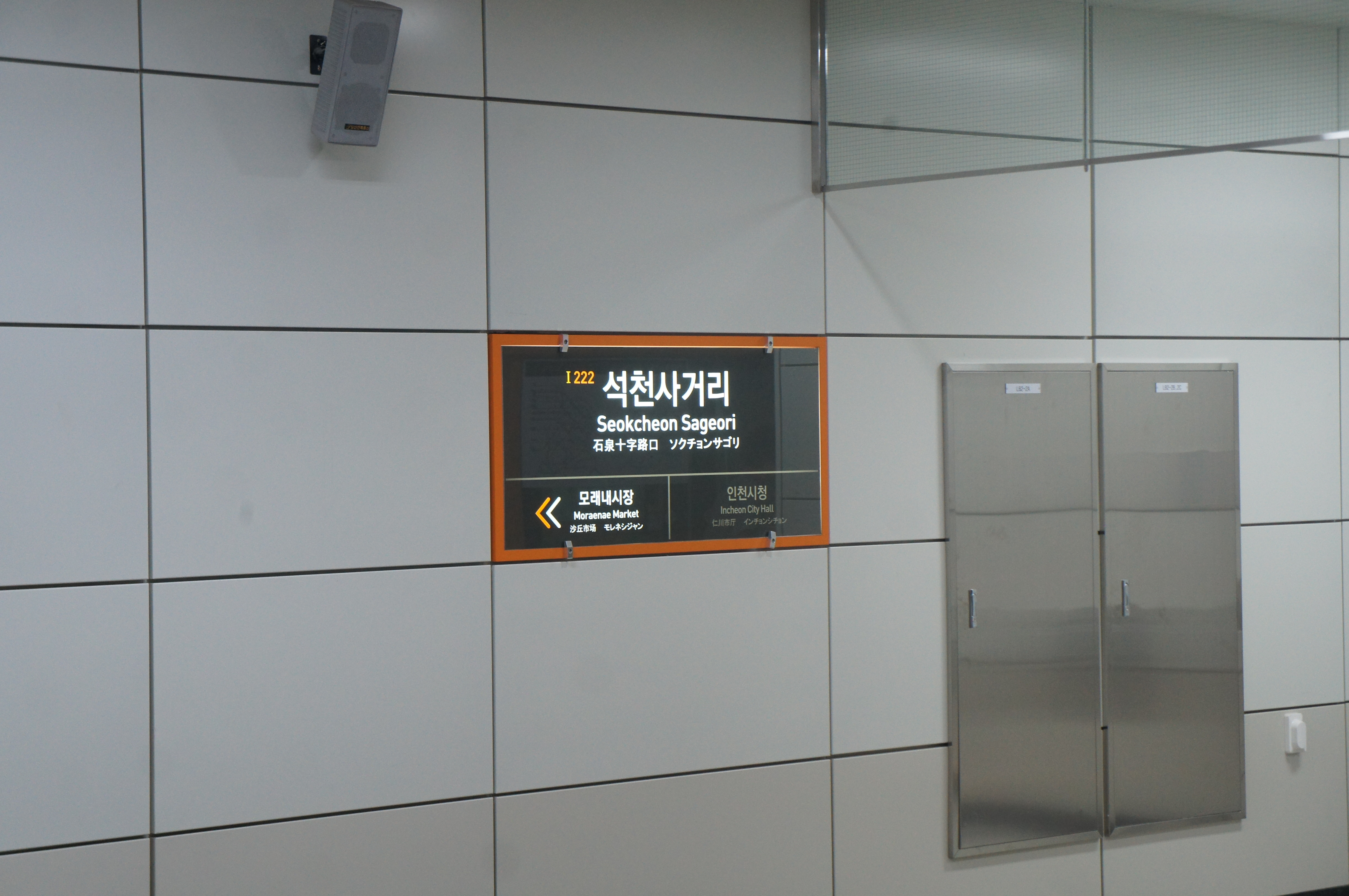 석천사거리역 역명판